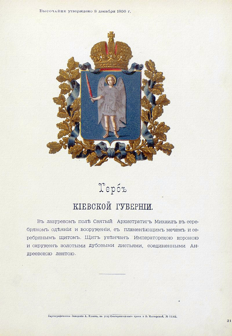 Official Russian Empire coat of arms Kiev Governorate. Герб Российской Империи Киевской губернии с официальным описанием в Гербовнике Бенке. Утверждён Императором Всероссийским Александром Вторым.